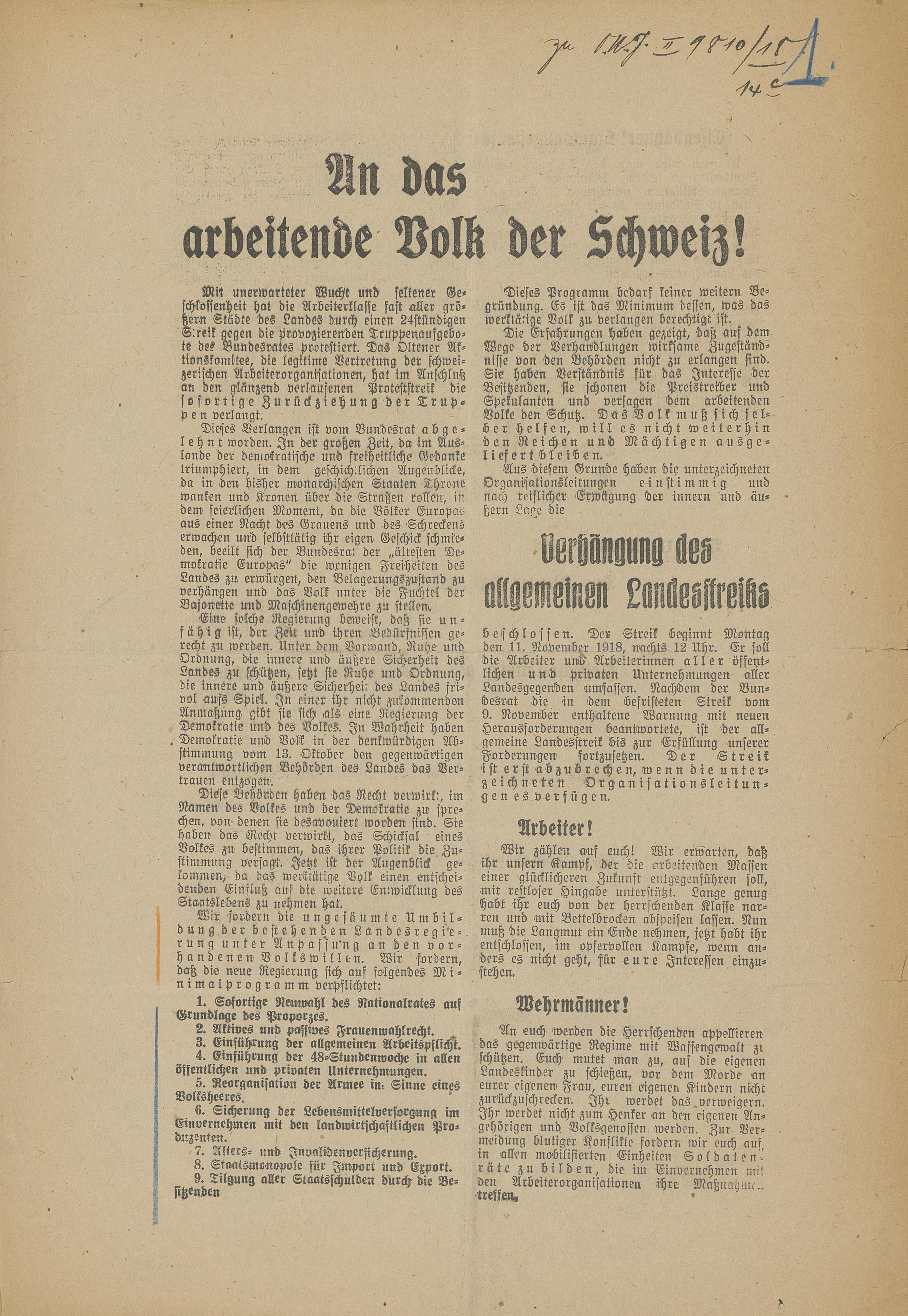 Flugblatt des Streikkomitees zur Verhängung des allgemeinen Landesstreiks (Schweiz), Seite 1. PDF der beiden Seiten in hoher Auflösung: File:SBB Historic - GD BAU SBBPERS 01 02 01 - Flugblatt des Streikkommitees zur Verhaengung des allgemeinen Landesstreiks.pdf